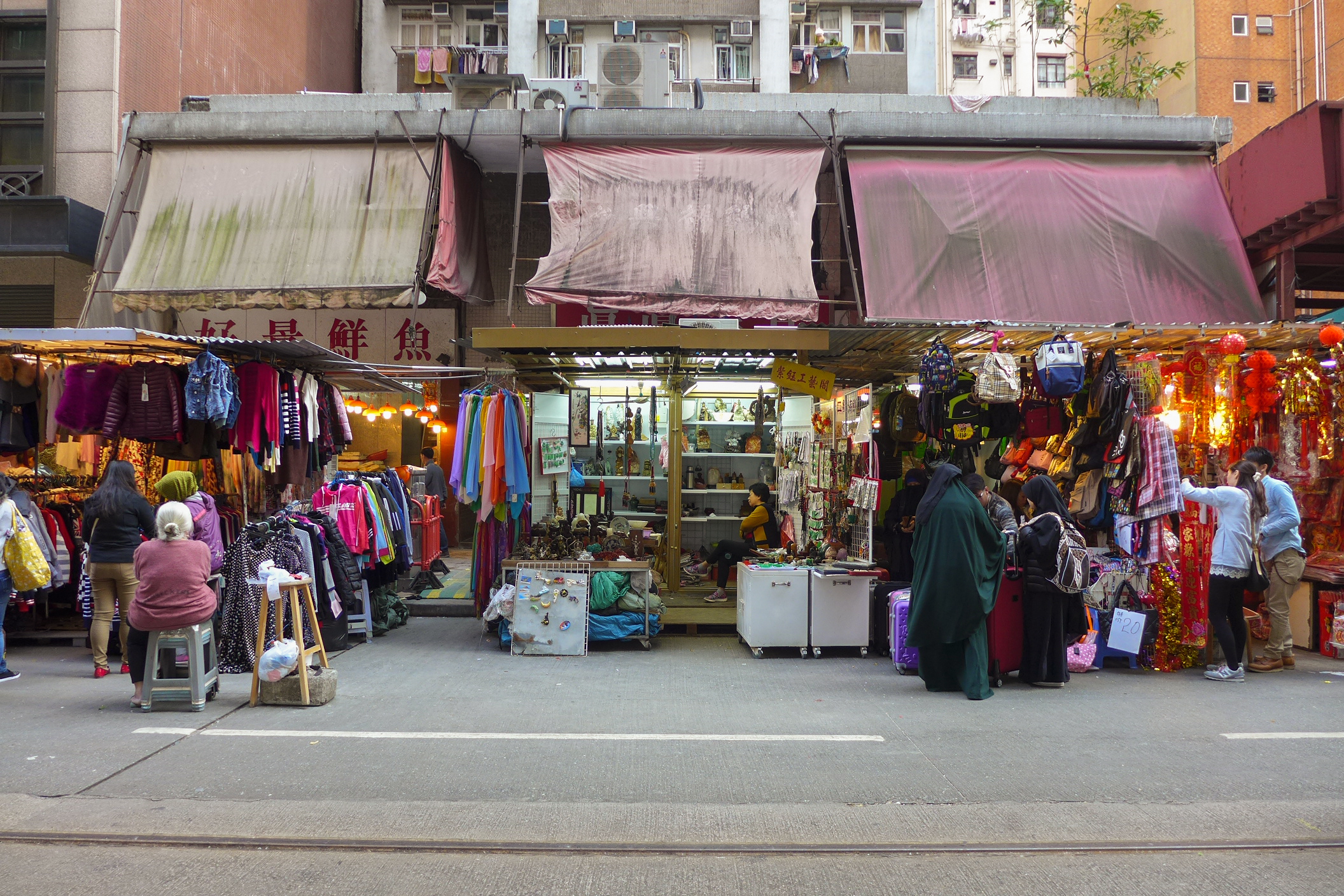 Chun Yueung Street